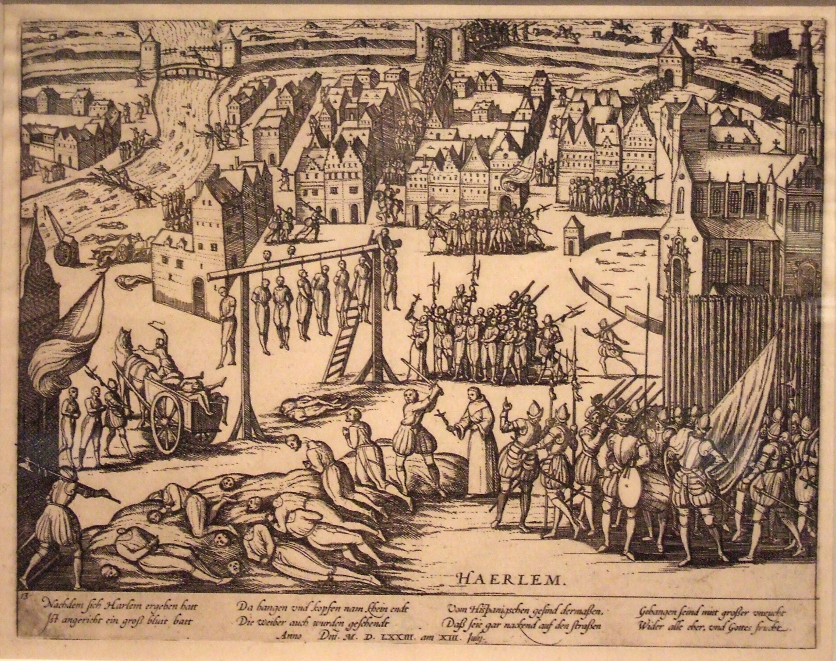 Beleg van Haarlem - executies door de Spanjaarden, ets Origineel gefotografeerd in de dependance van het Rijksmuseum op Schiphol.